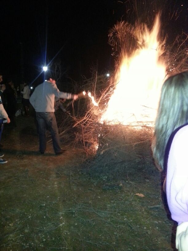 Hogueras de la fiesta de las Candelarias de Láchar, en la provincia de Granada (España)